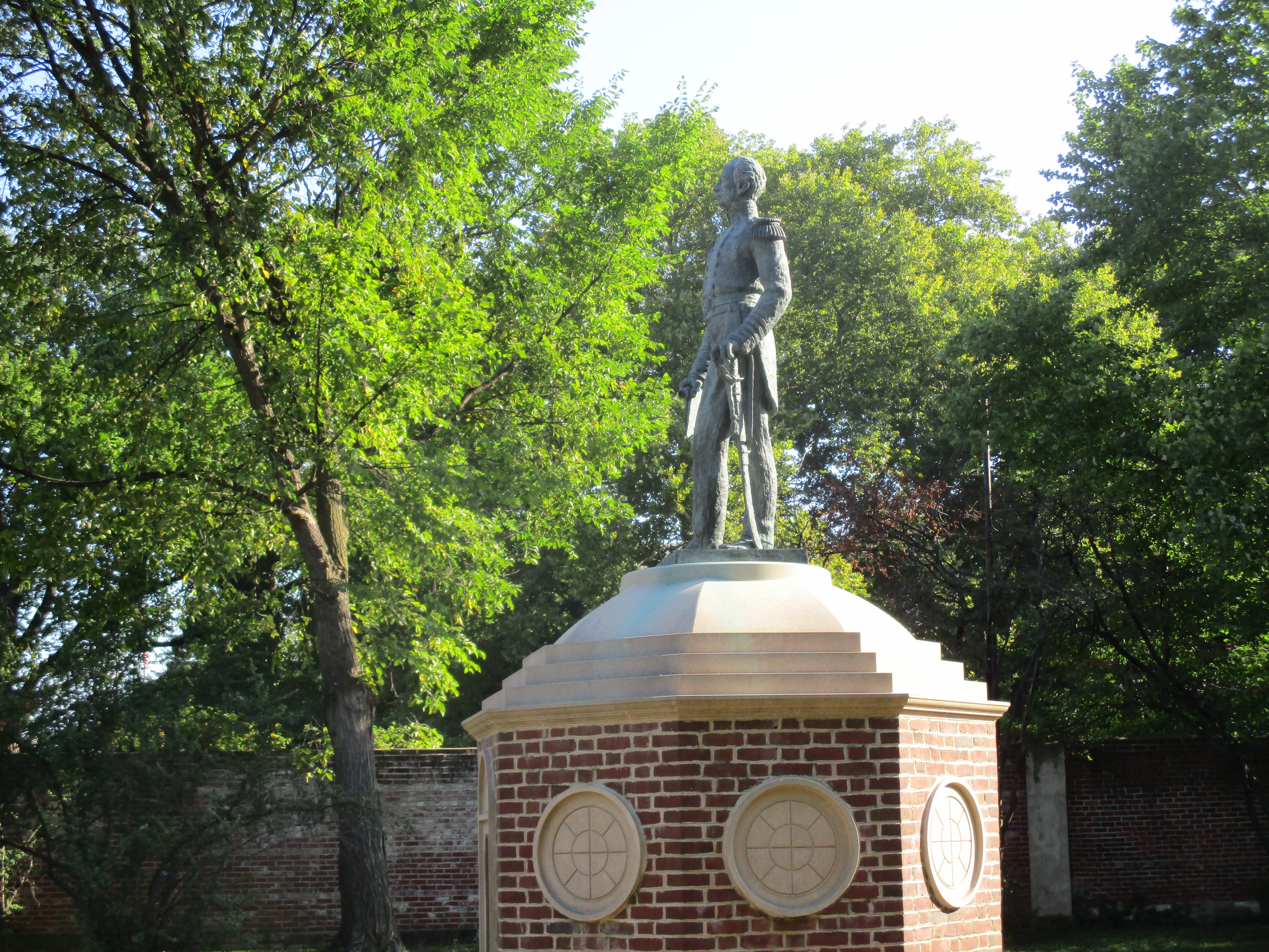 הפסל מוצב ברחבה שלפני בית הכנסת קהל קודש במרכז פילדלפיה